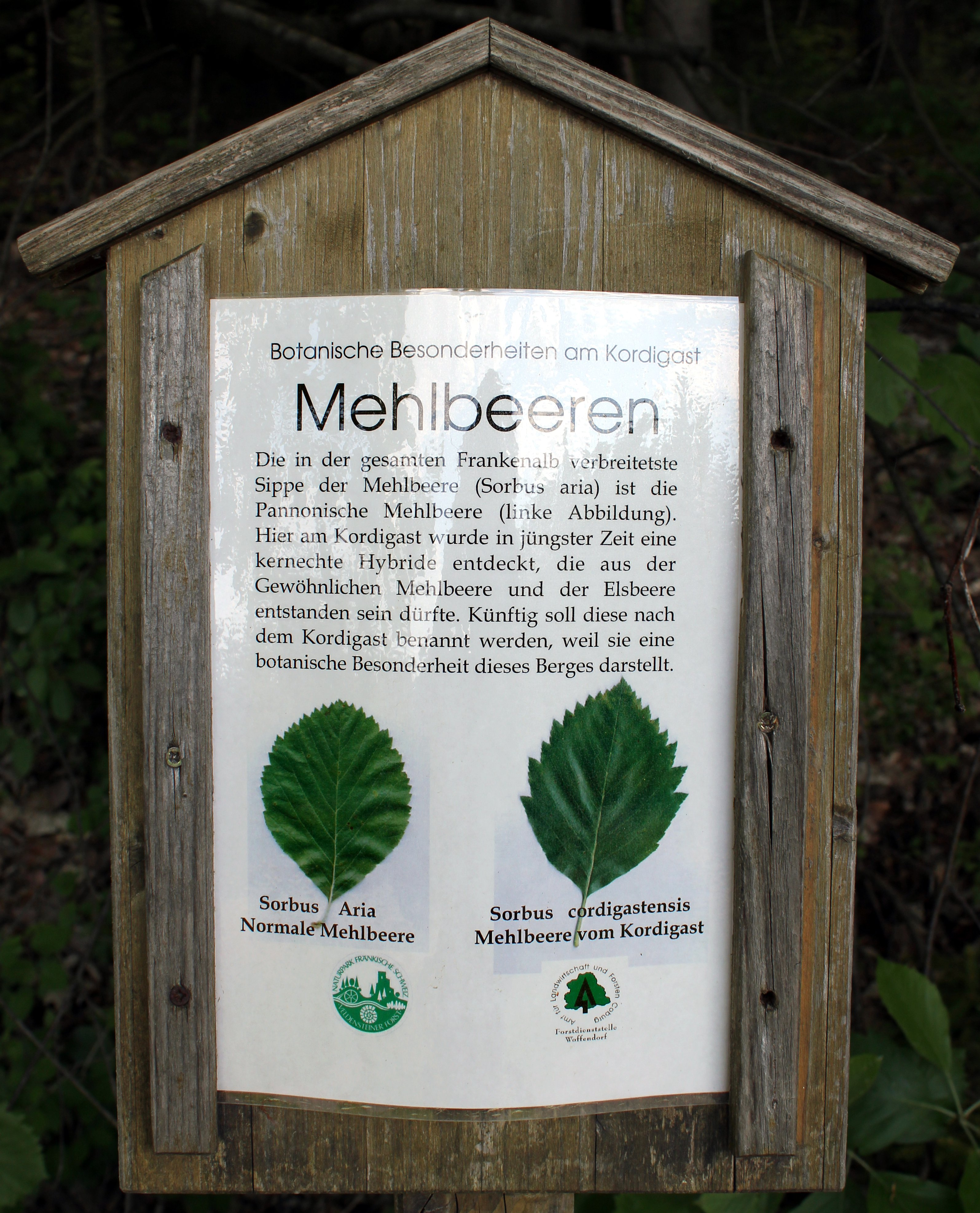 Informationstafel über die Kordigast-Mehlbeere auf dem "Kordigast" Fotograf: Trollhead